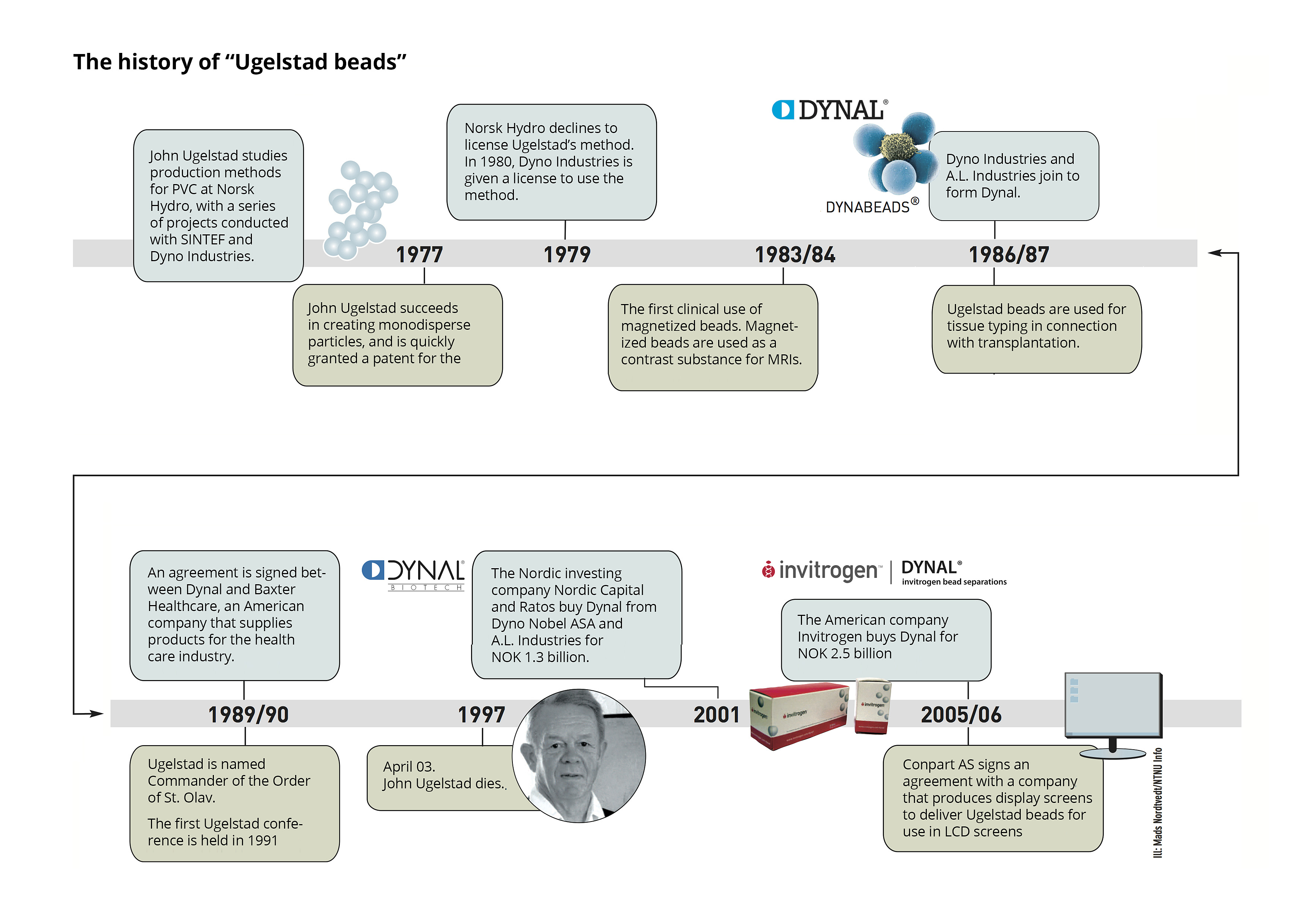 grafisk fremstilling av ugelstadkulenes historie 1977–2005/2006